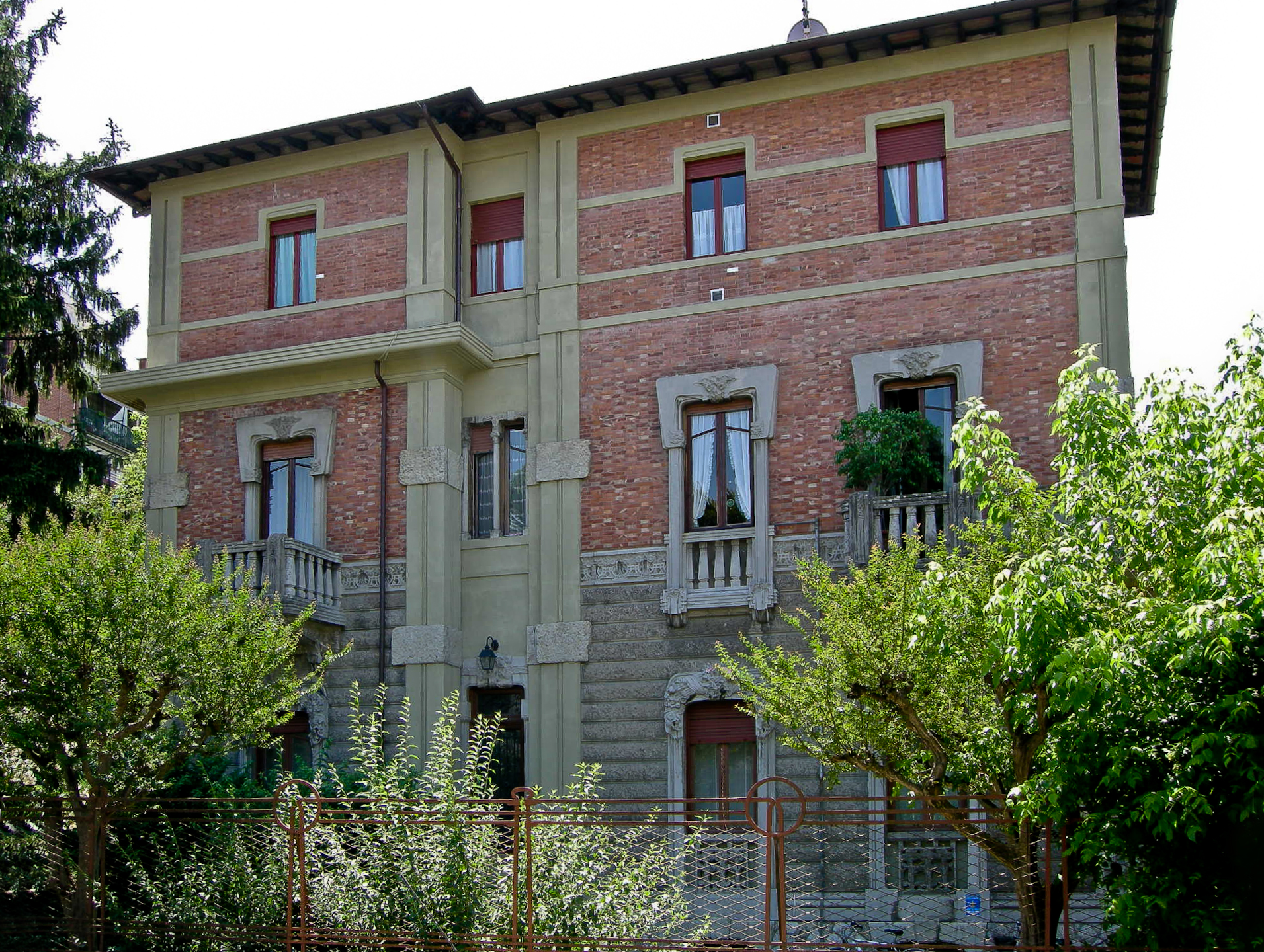 Villa giomi 03 bearbeitet